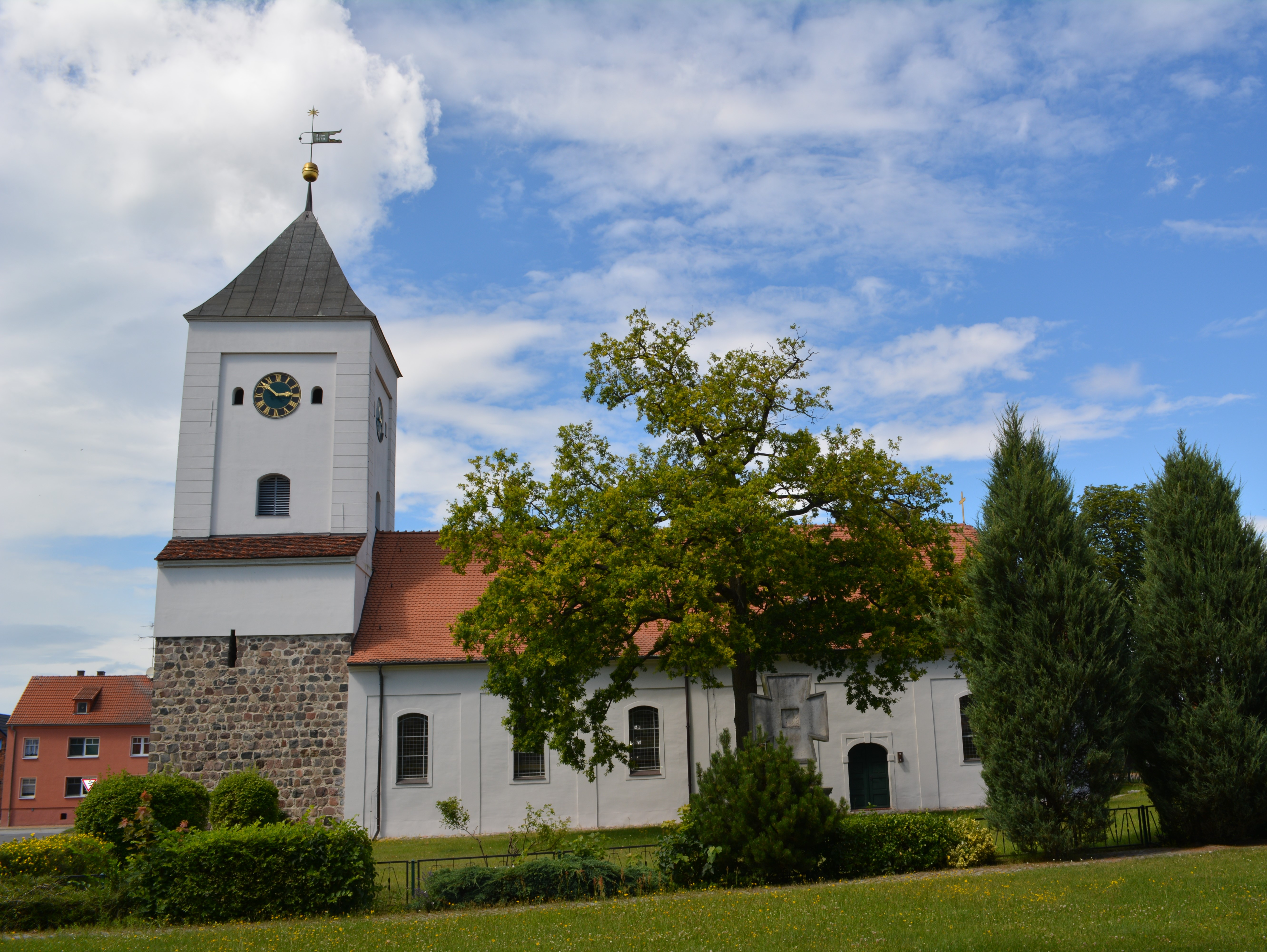 Denkmalgeschützte evangelische Stadtkirche in Rhinow, Landkreis Havelland, erbaut 1734-1745